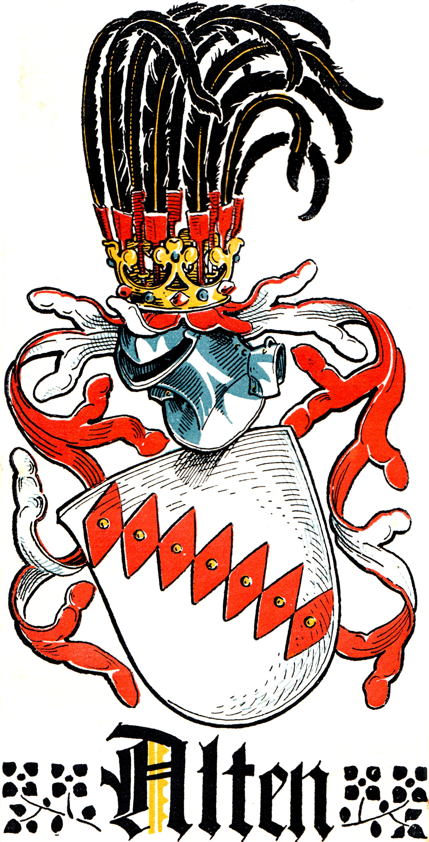 Wappen derer von Alten